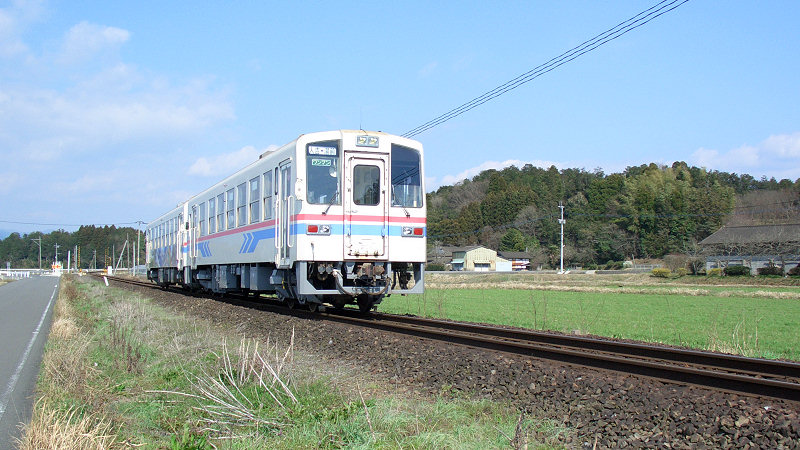 木上駅－おかどめ幸福駅間の沿線風景 手前がja:人吉駅方面、奥がja:湯前駅方面。 撮影者/著者/著作権保有者 : MK Products (本人がアップロード) 撮影日 : 2007/03/22 くま川鉄道湯前線用にアップロードした画像です。良い画像があれば別の画像に変えてください。